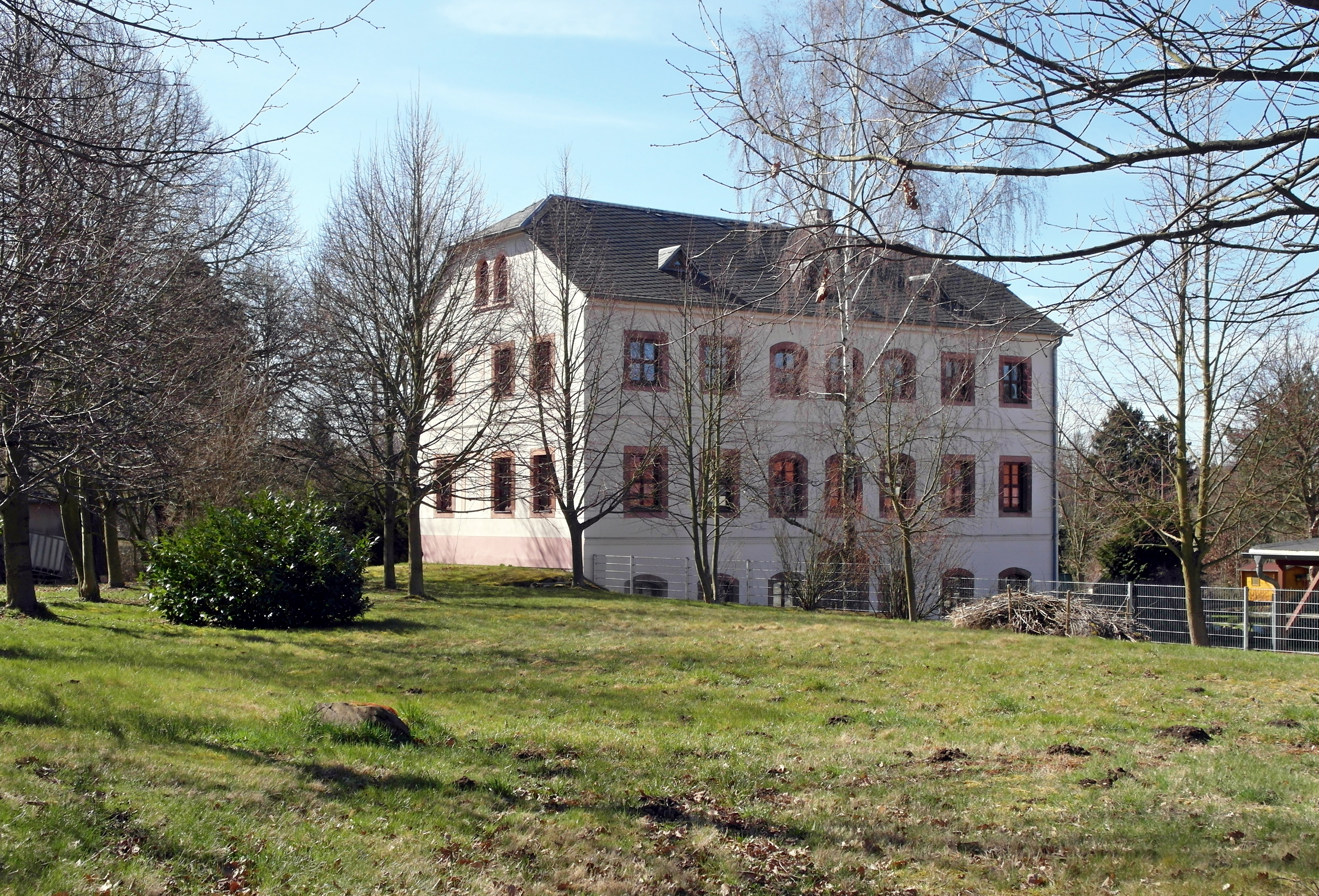 06.04.2018 093626 Klostergeringswalde (Geringswalde): Herrenhaus Klostergeringswalde, Waldheimer Weg 6 (GMP: 51.073948,12.918655). Hermann II. von Schönburg stiftete 1233 in Geringswalde ein Benediktinerinnenkloster. Nach der Reformation wurde es wieder aufgelöst. Über ein kurfürstliches Kammergut entstand daraus ab 1625 das Rittergut Klostergeringswalde mit durchweg bürgerlichen Besitzern bis 1945. Von Kloster und Rittergut ist nur das abgebildete Wohnhaus übrig geblieben. 2000 wurde es vom Eigentümer saniert. Nordostseite. [SAM4867.JPG]20180606100DR.JPG(c)Blobelt